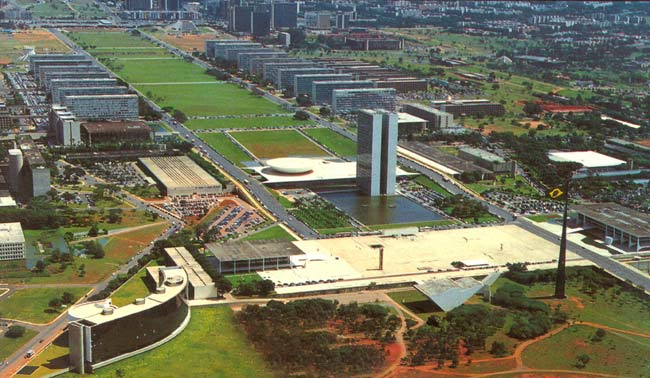 Praça dos Três Poderes em Brasília Data: desconhecida Autor e Fonte: STF - Supremo Tribunal Federal [1] OBS: As fotos do STF podem ser usadas gratuitamente, devendo se dar os créditos devidos ao STF.